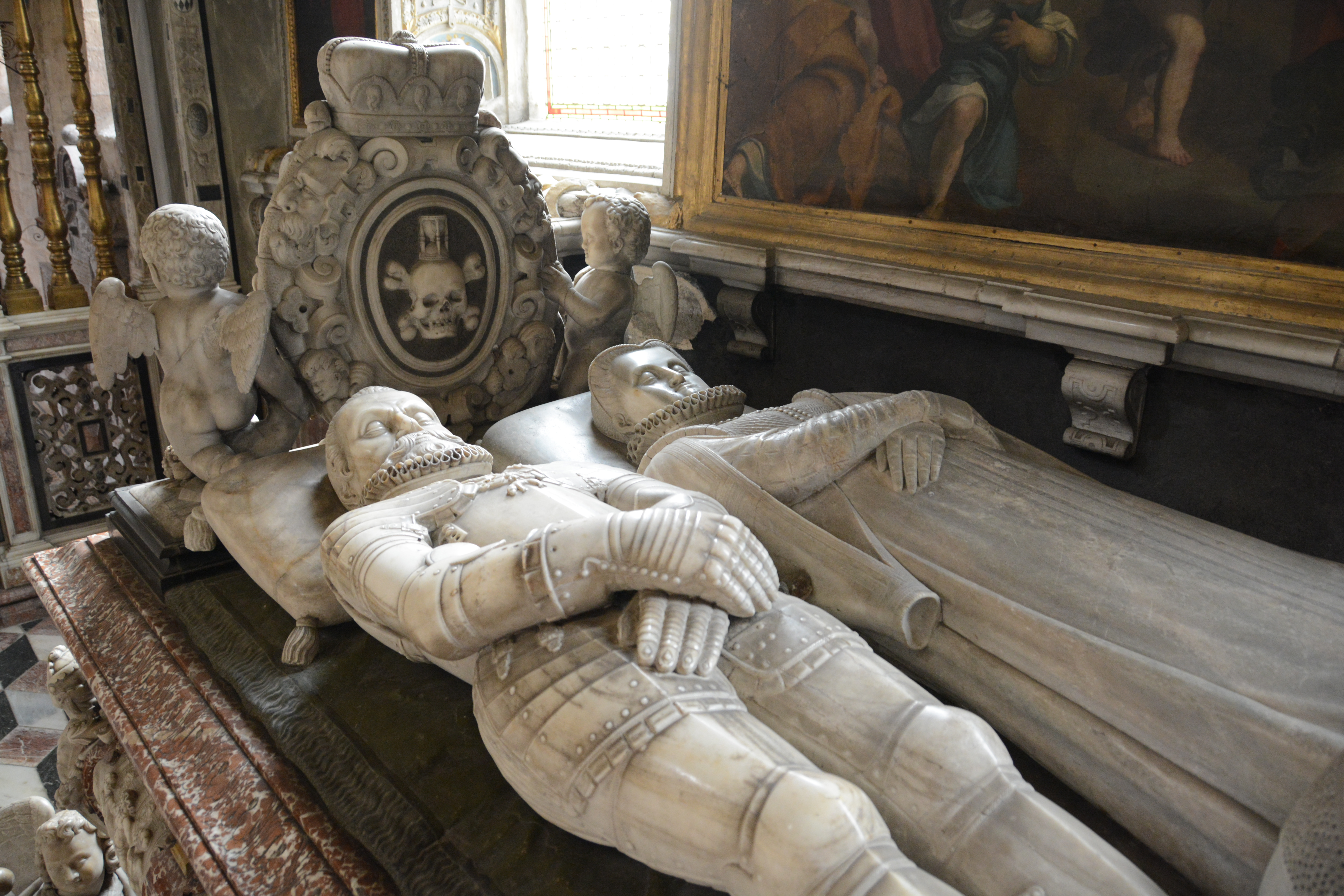 Seckau – Mausoleum, inszeniertes Sterben: Basilika Seckau, Habsburger Mausoleum, Kenotaph Dieses Bild wurde anlässlich des österreichischen Tags des Denkmals 2014 in der Steiermark eingereicht.